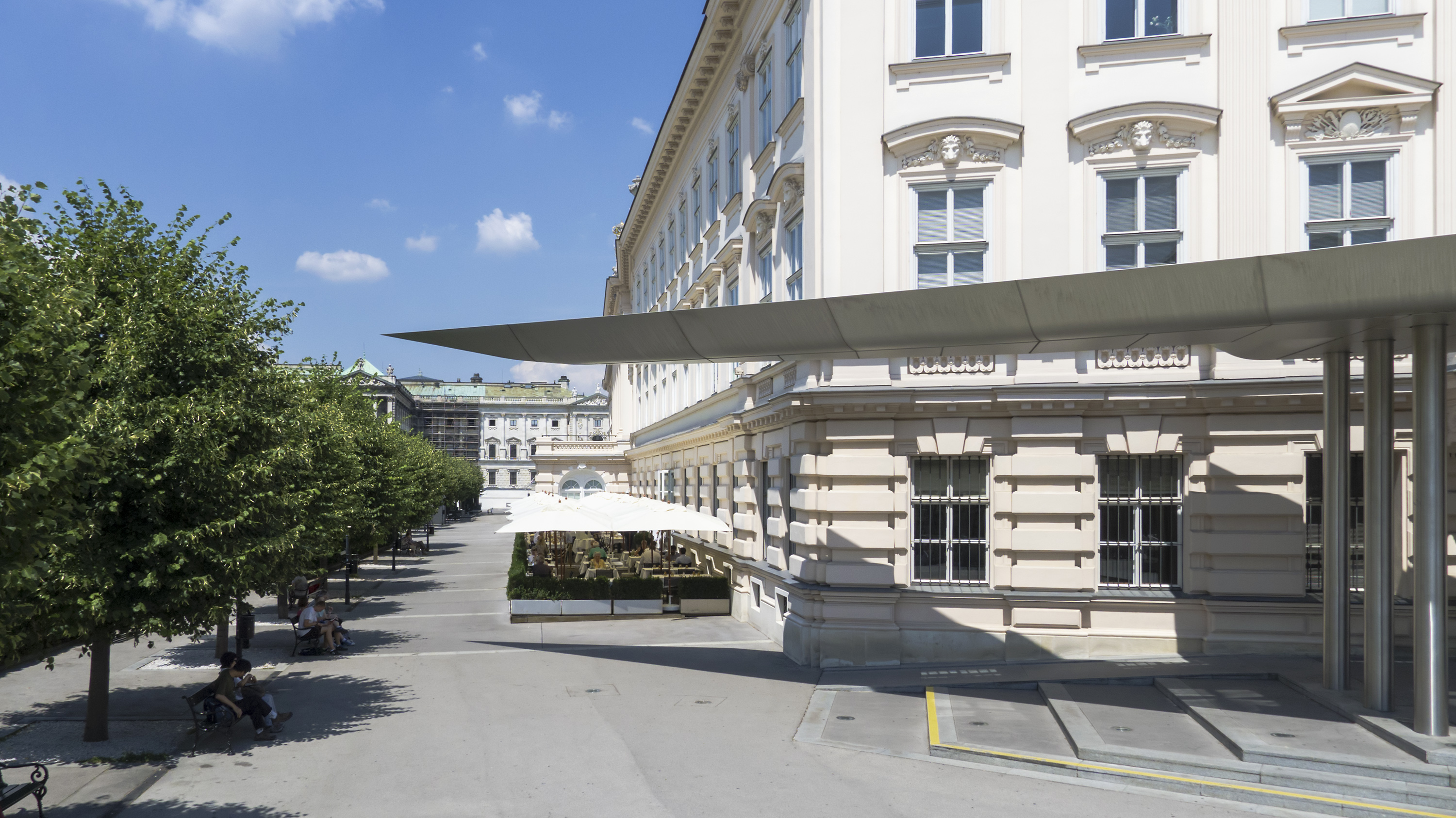 Augustinerbastei in Wien 1 bei der Albertina Richtung Nordwesten